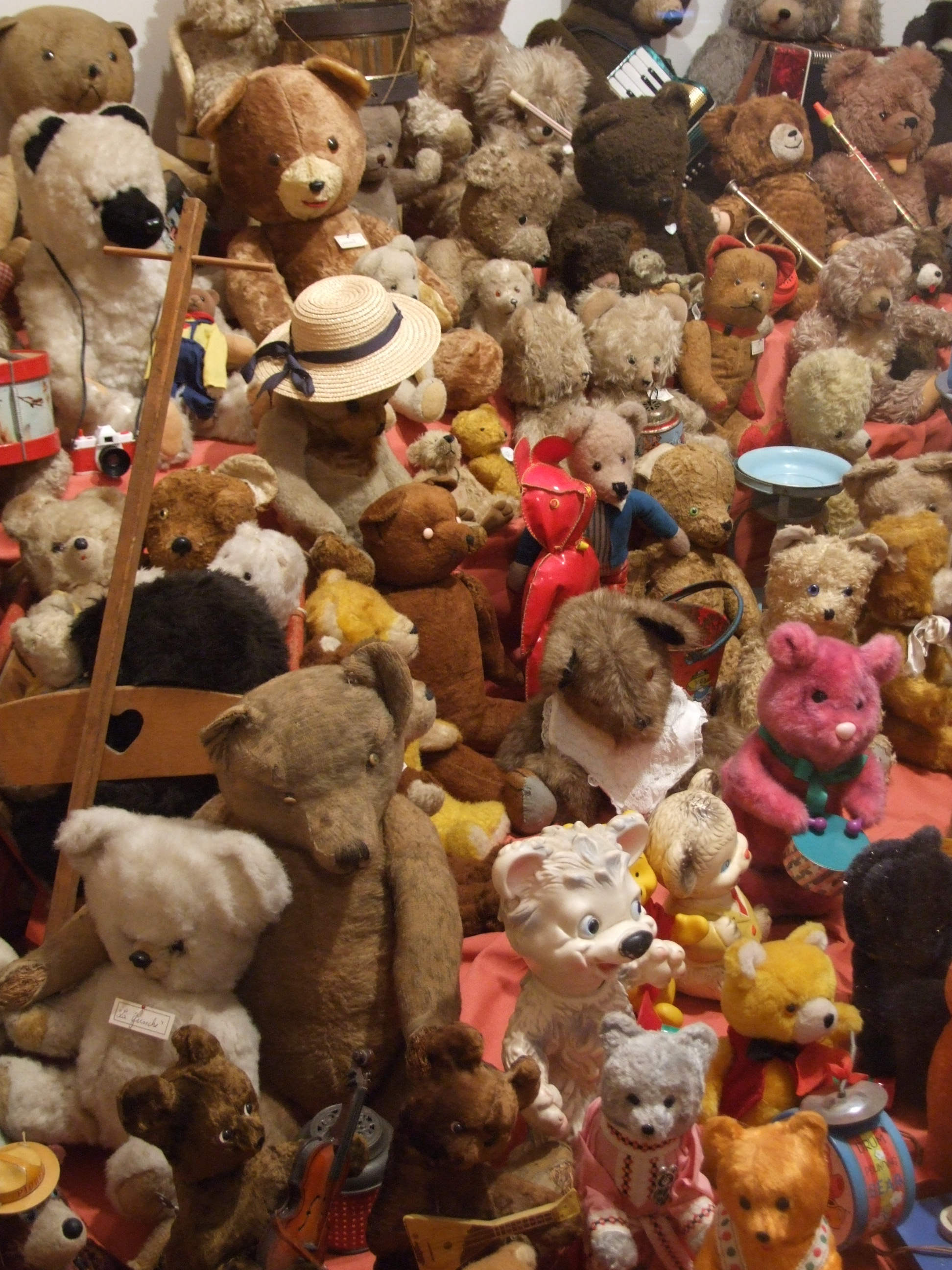 Exposition temporaire sur les jouets de Noël, Musée du château de Montbéliard, Montbéliard, Doubs, Franche-Comté, FRANCE